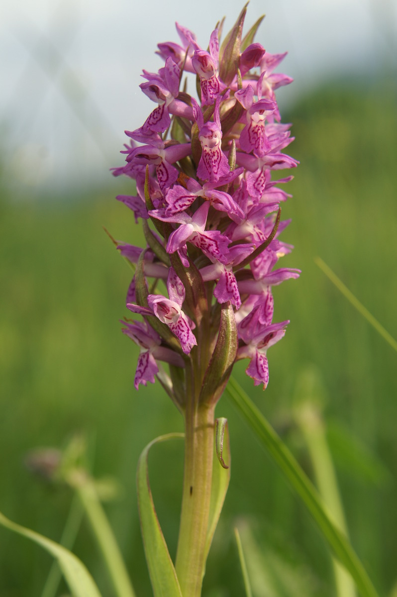 Mesnordeča prstasta kukavica na Ljubljanskem barju.